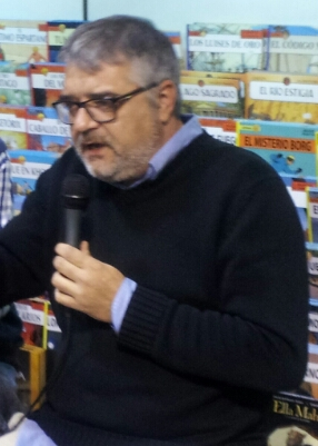 Manel Gimeno.